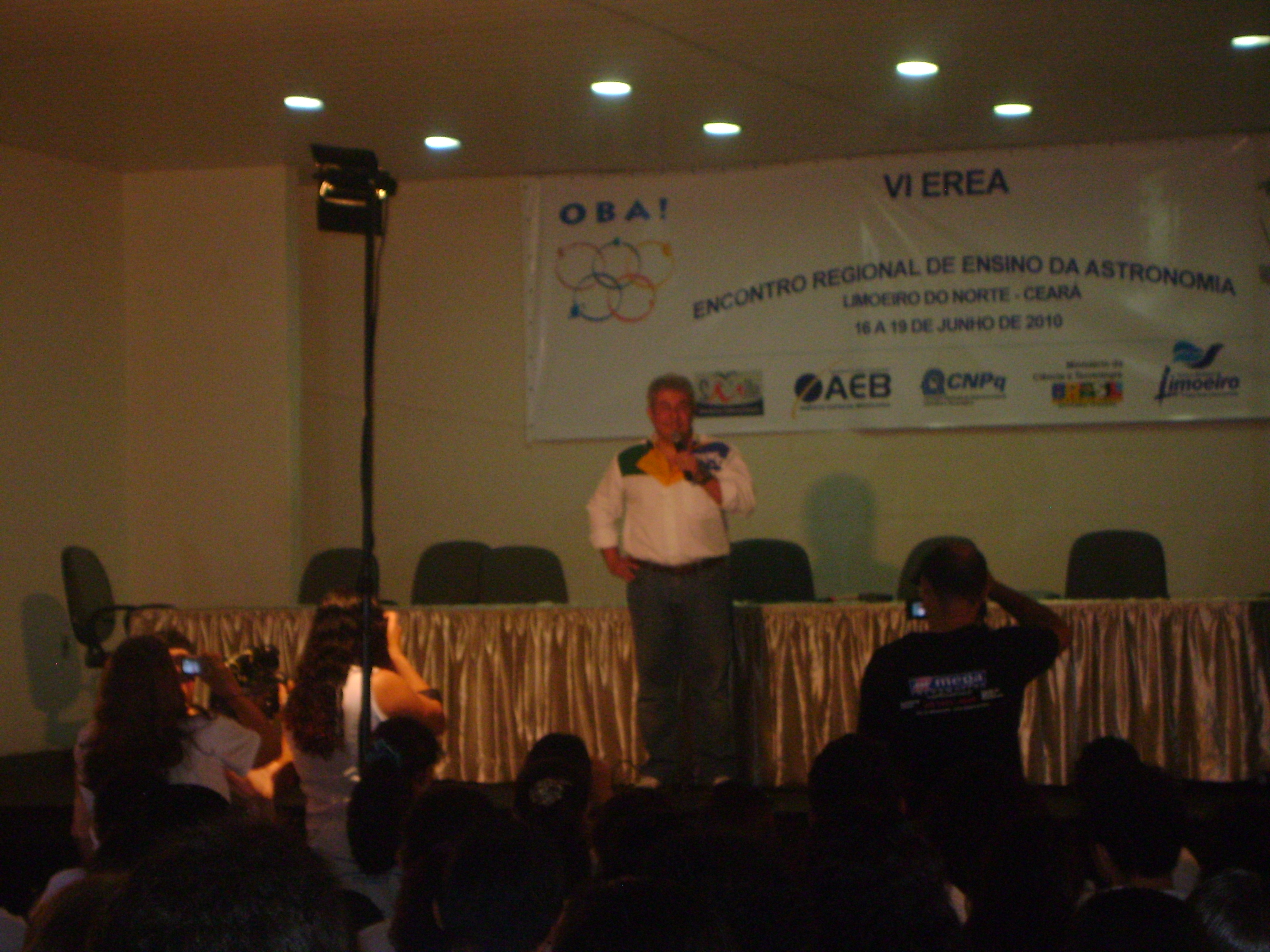 durante o IV encontro regional de astronomia